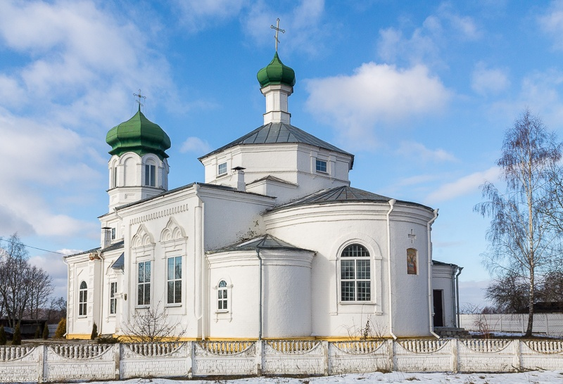 Свята-Успенская царква ў в. Галяні 1 Магілёўскага раёна